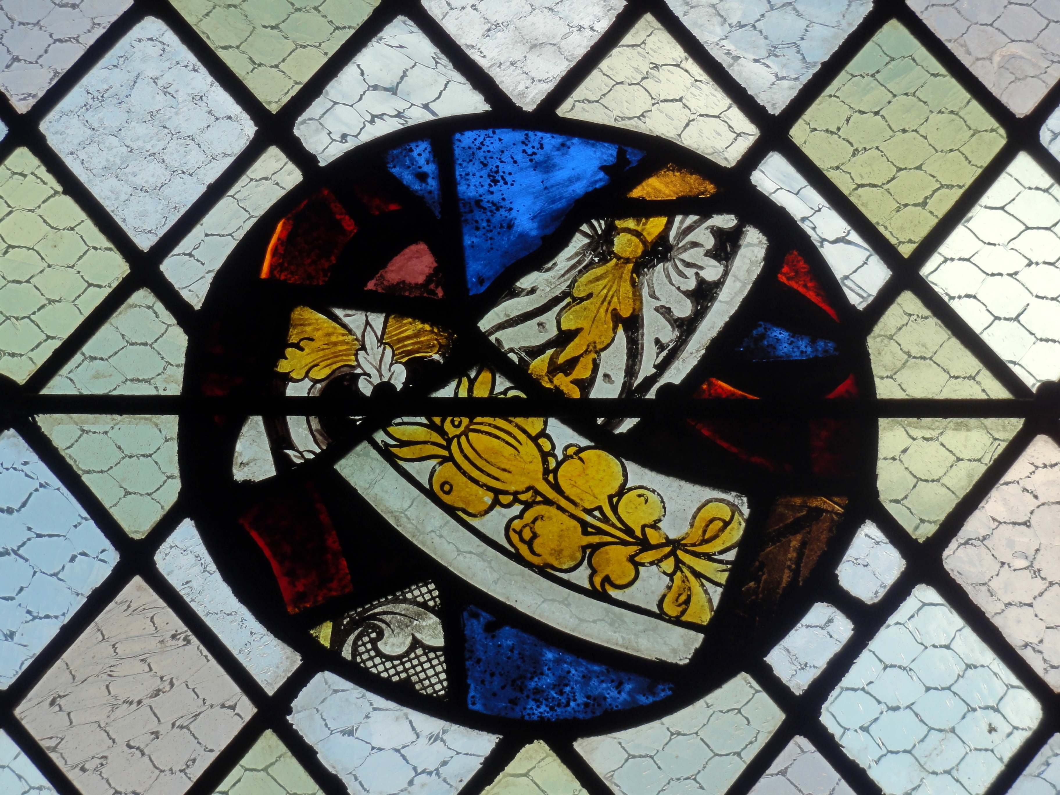 Vaisseau nord, 4e travée, derniers fragments de vitrail du XVIe s.